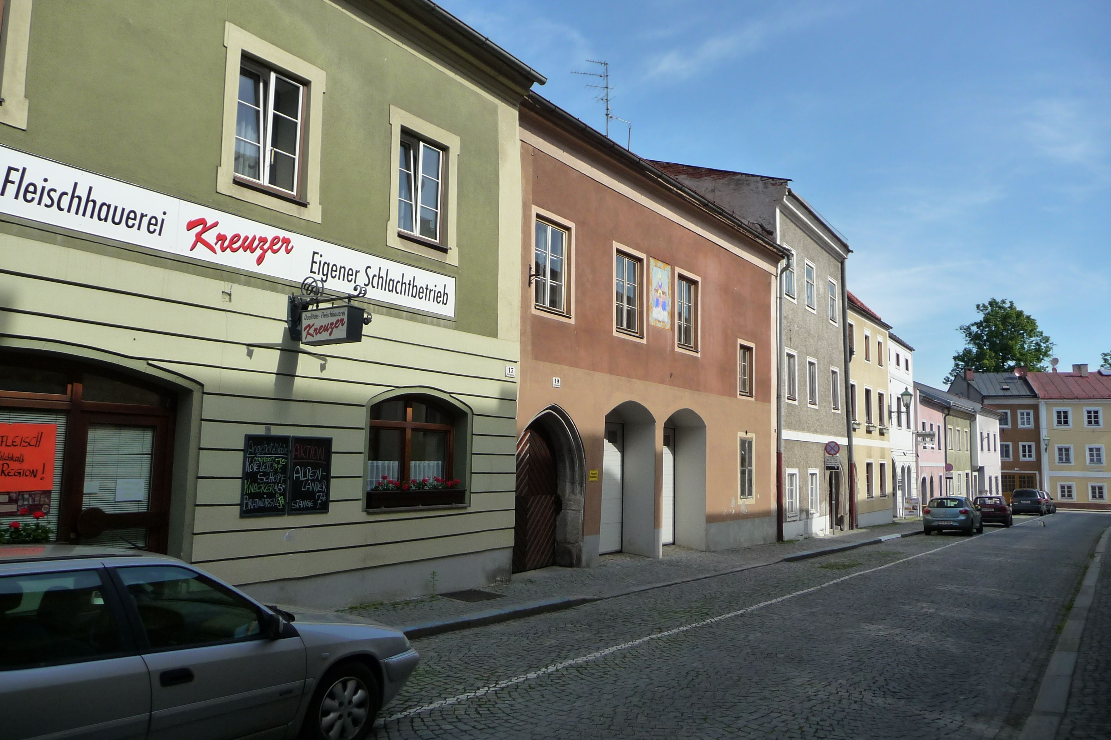 Salzgasse in Freistadt